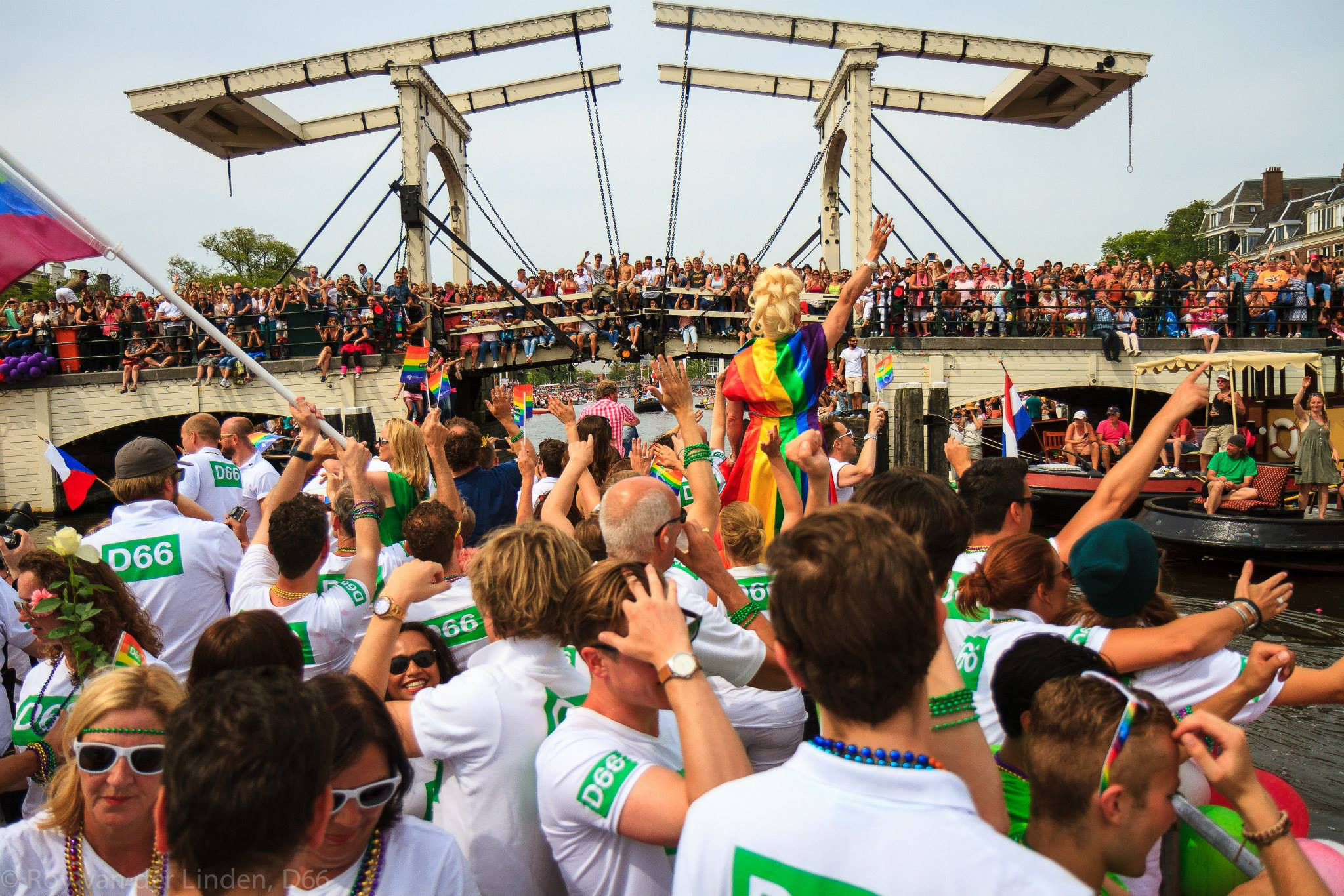 Amsterdam Pride 2015